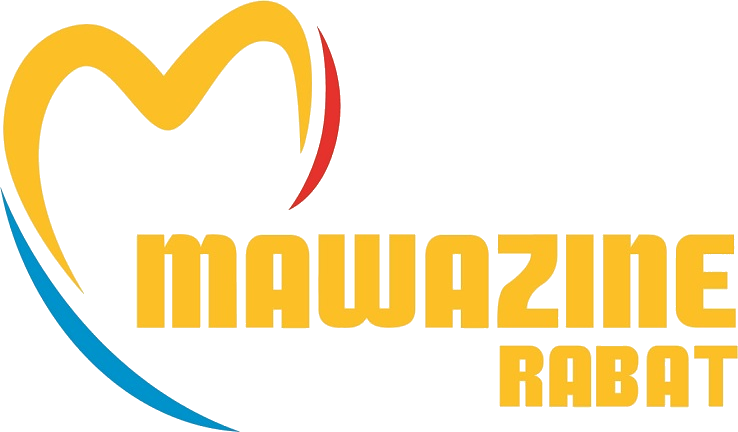 Logo Mawazine Rythms de monde